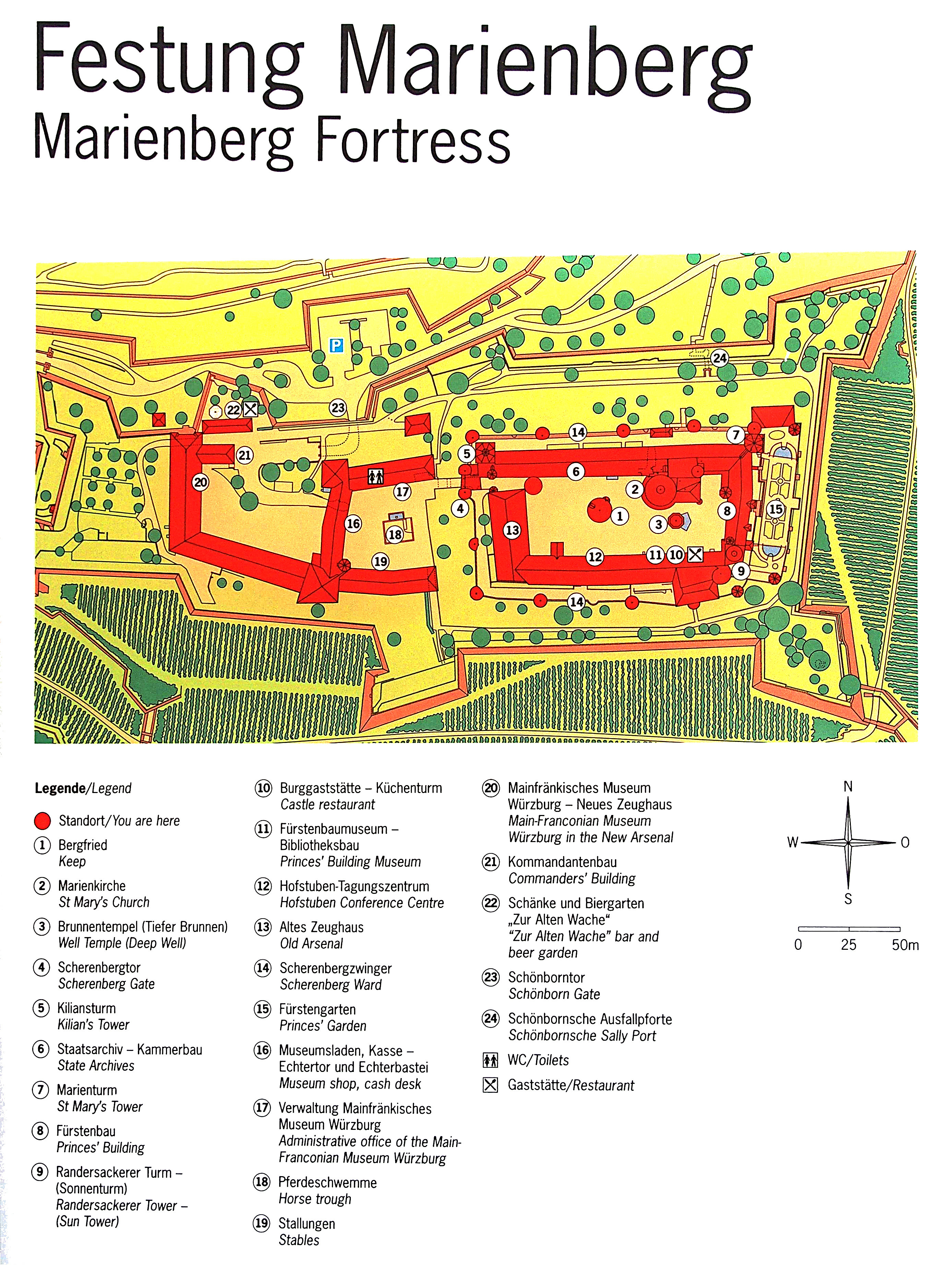 Infoplan der Festung Marienberg